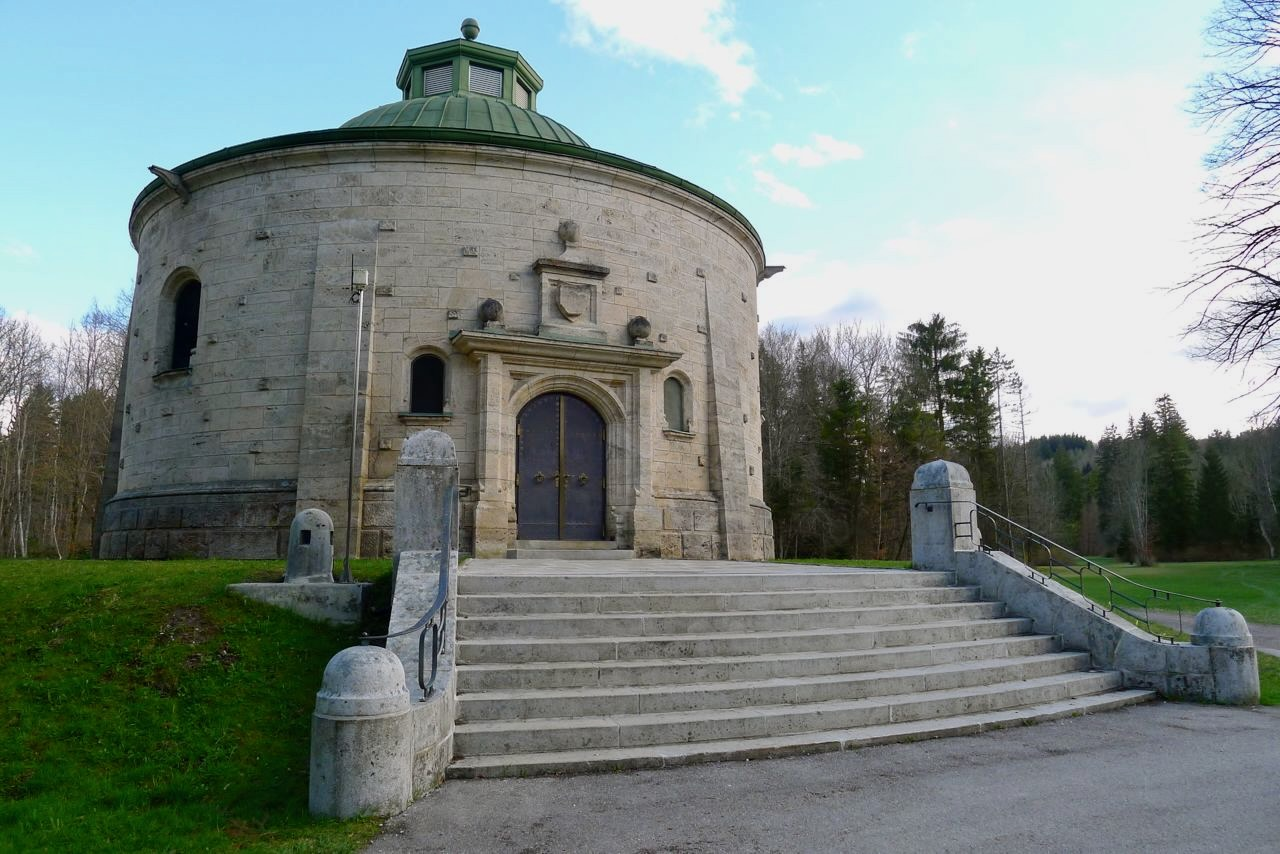 Wasserversorgung der Stadt München: Hauptsammelschacht Reisach - Wasserschloss im Mangfalltal